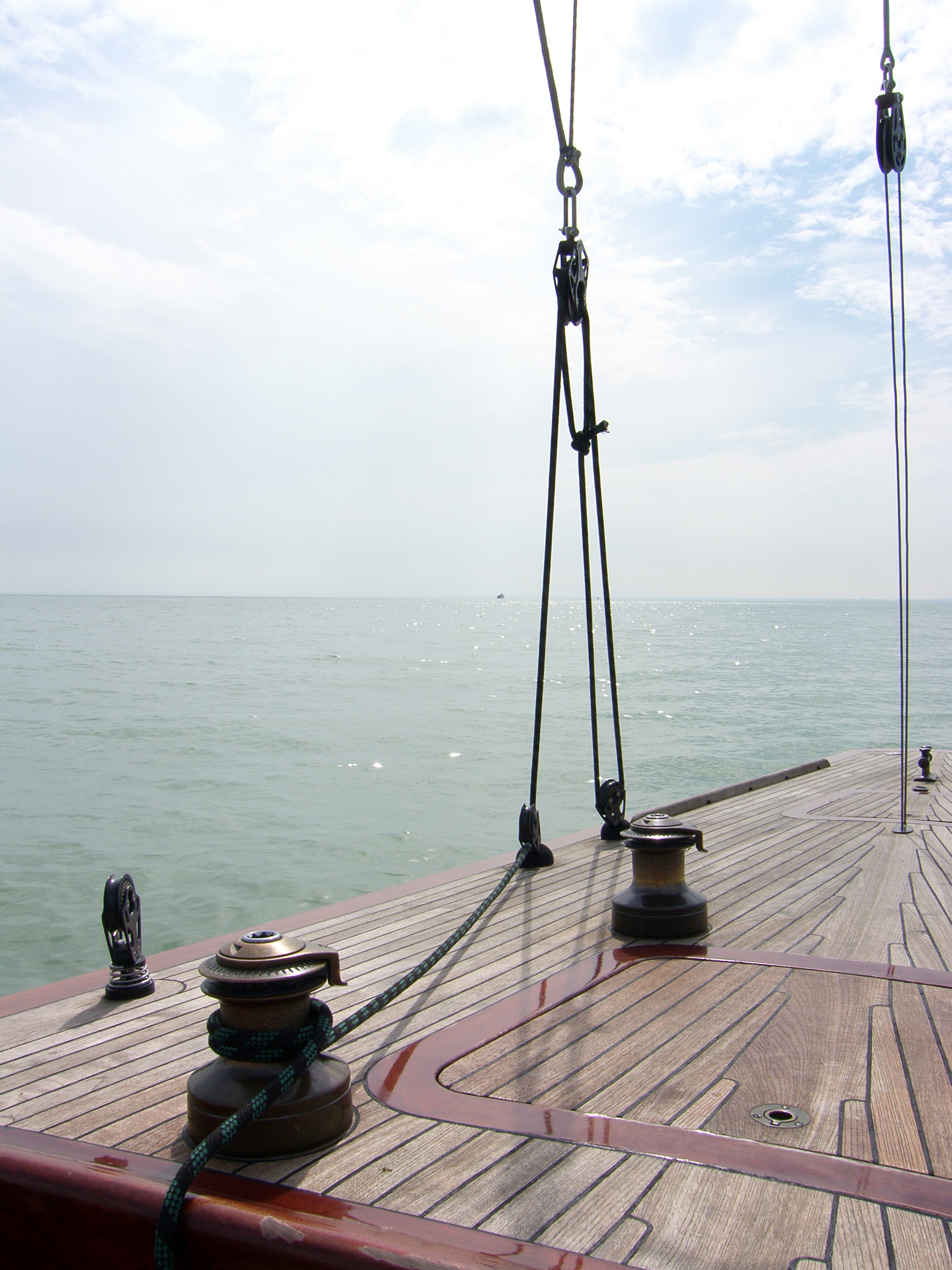 A Nemere II. egy 75-ös cirkáló (Schärenkreutzer), a Balaton legendás zászlóshajója. Az 1944-ben épített Nemere vitorlás hétszer állt rajthoz a balatoni Kékszalagon, s 5 győzelmet aratott. 1955-ös 10 óra 40 perces rekordját 57 éven át nem tudták túlszárnyalni. A kilencvenes években partra tett, leromlott állapotú hajót, Láng Róbert építette újjá az eredetivel megegyező formában.